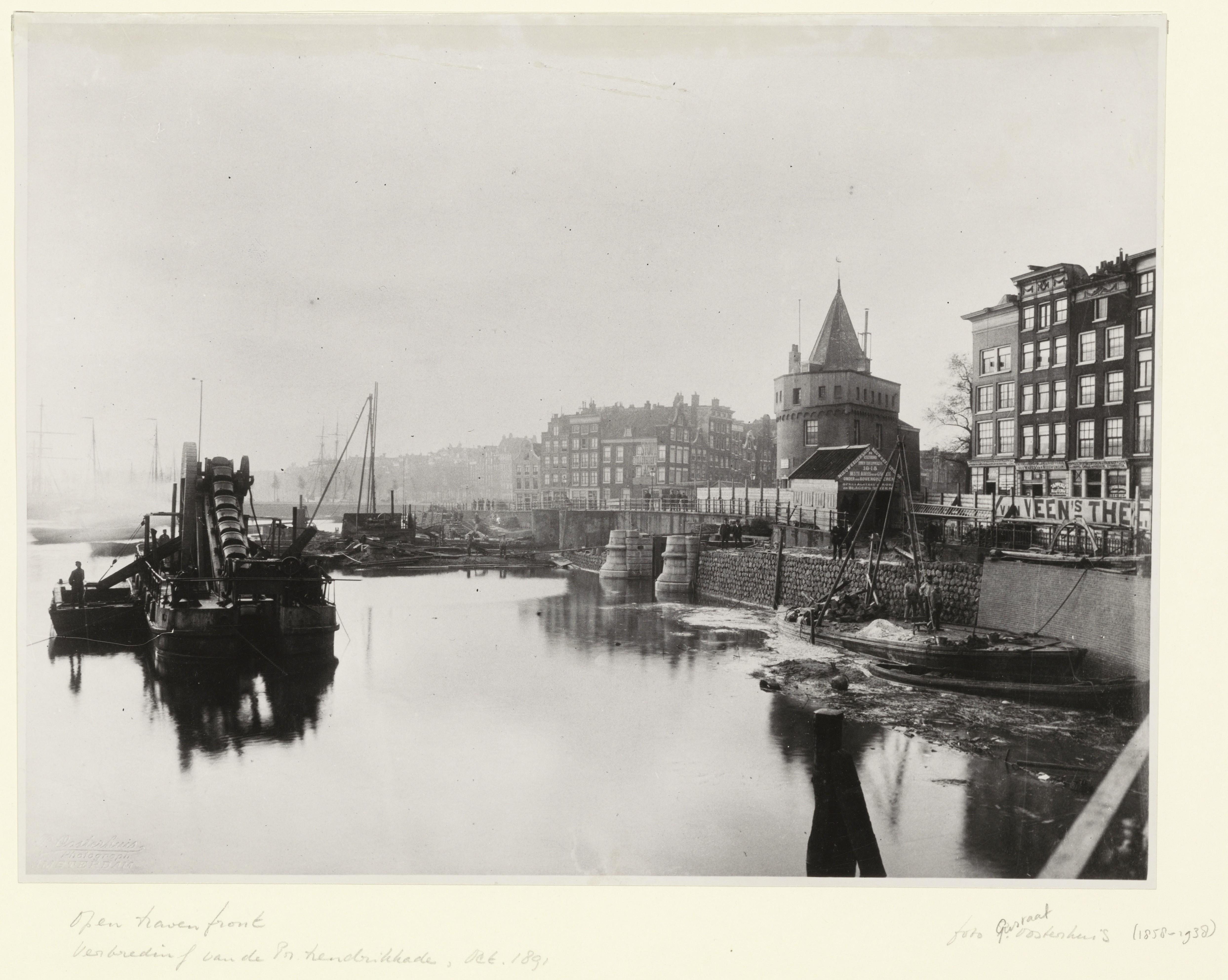 De verbreding van de Prins Hendrikkade ter hoogte van de Kolkswaterkering (brugnummer 301), gezien vanaf het Open Havenfront Rechts de huizen aan de Prins Hendrikkade (vrnl) 90 (ged.), 91, 92 en 93 en de Schreierstoren op de nummers 94-95. Links op de achtergrond Geldersekade 1-11 en Prins Hendrikkade 96, 97, 98 en hoger. Techniek: moderne reproductie naar een originele foto. Documenttype foto Vervaardiger Oosterhuis, Gustaaf (1858-1938) Collectie Collectie Stadsarchief Amsterdam: foto-afdrukken Datering oktober 1891 Geografische naam Open Havenfront Prins Hendrikkade Inventarissen Afbeeldingsbestand ANWQ00309000001 Generated with Dememorixer